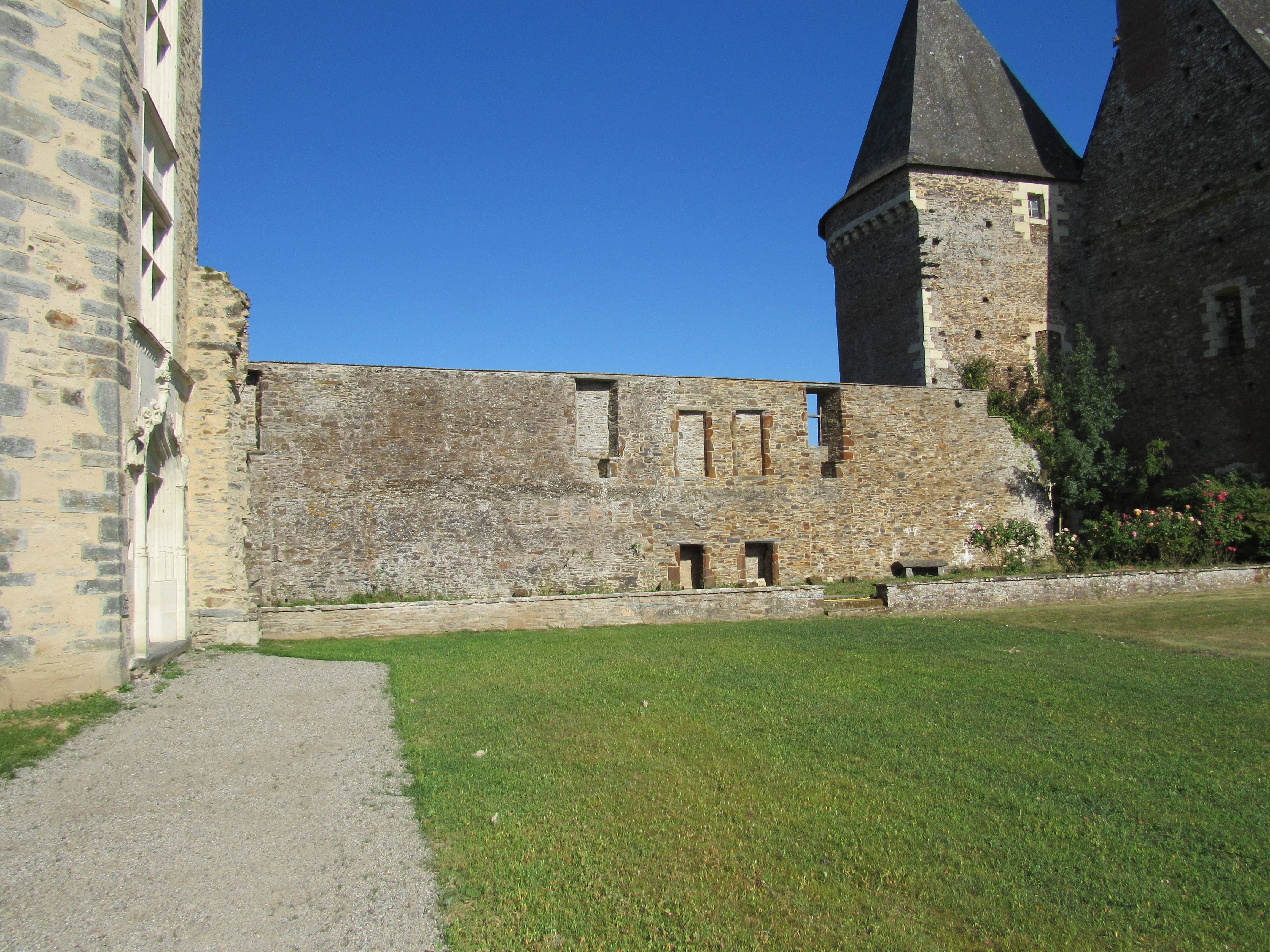 Ruine de l'ancien pressoir du château de la Motte-Glain.